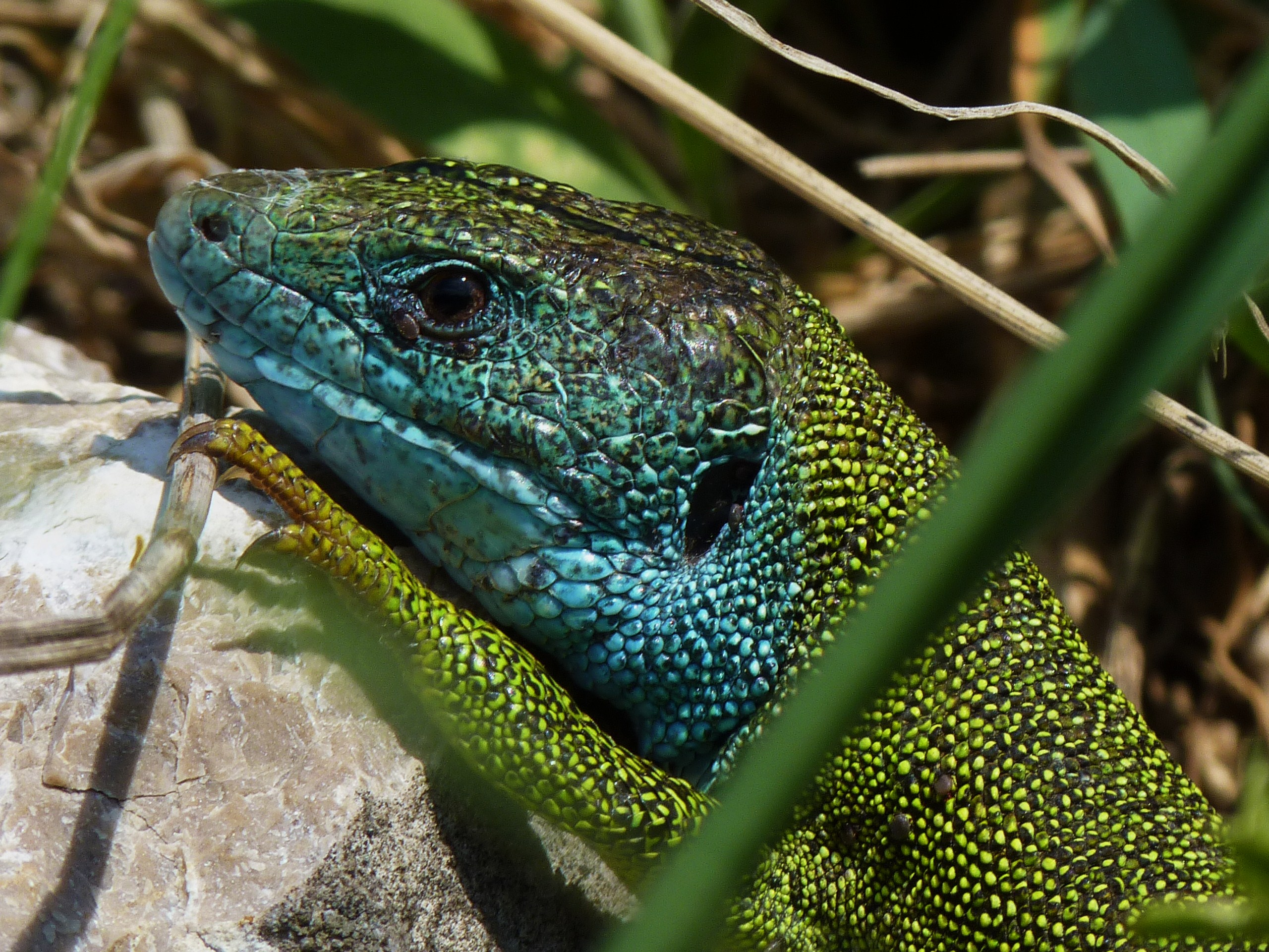 Smaragdeidechse